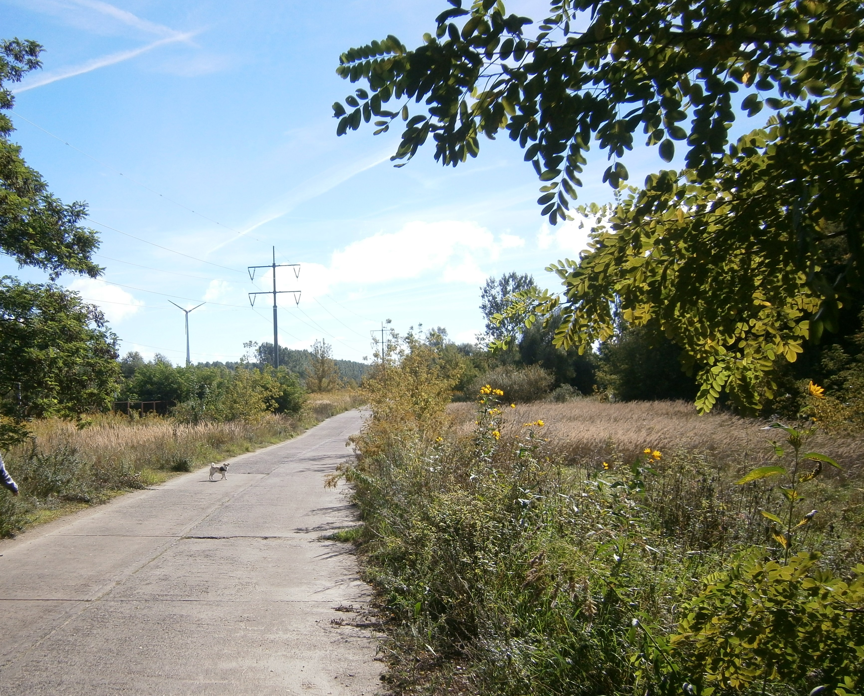 Der Bauernweg ist eine Straße in Berlin-Blankenfelde an der nördlihen Stadtgrenze und als Privatstraße und zur Zufahrt für die hier liegenden ehemaligen und bestehenden Deponie Arkenberge angelegt. In der Gesamtlänge als Bauernweg bezeichnet ist ein Teil amtlich gewidmet, zudem verläuft sie durch die KGA Arkenberge zur Hauptstraße als ungewidmete Straße (Fahrweg). Hier Blick an der Stadtgrenze und Berliner Außenring nach Osten. Nördlich der Bauschuttdeponie.